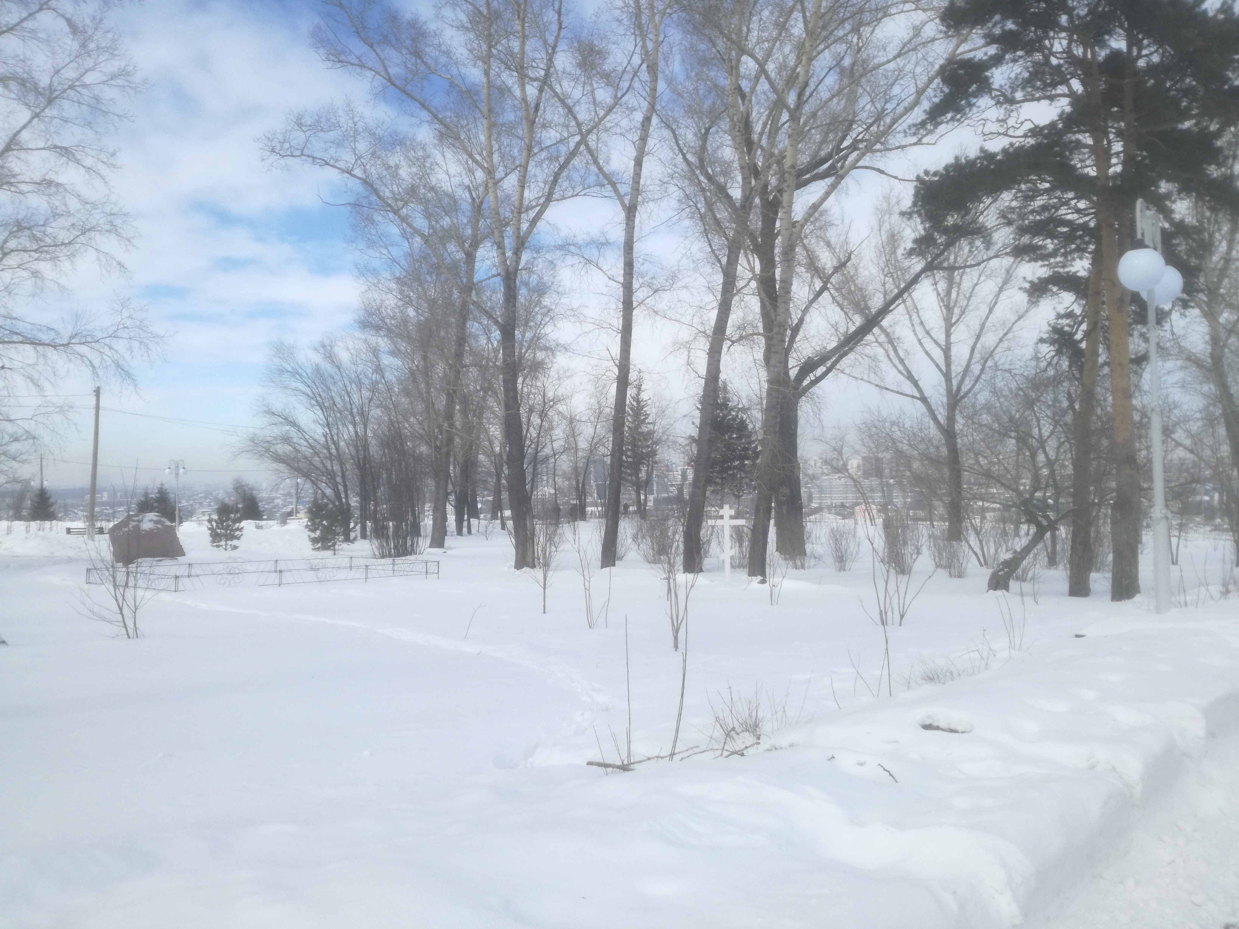 Нагорный парк в Барнауле